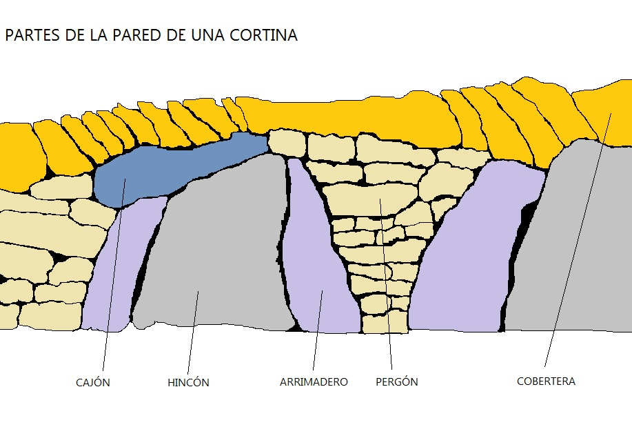 Partes de la pared de piedra de una cortina de Peñausende